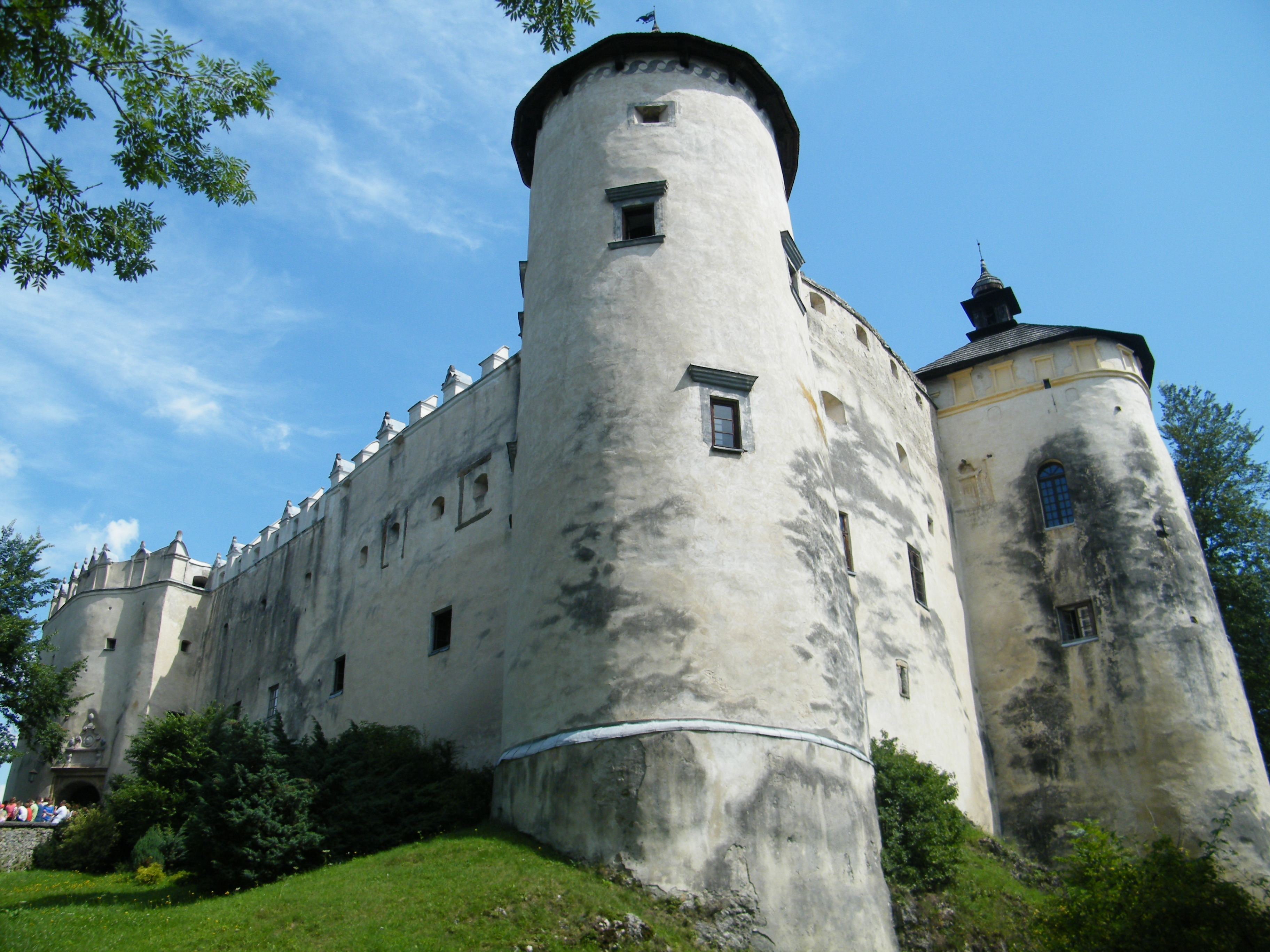 Zamek w Niedzicy. Gmina Łapsze Niżne, powiat nowotarski